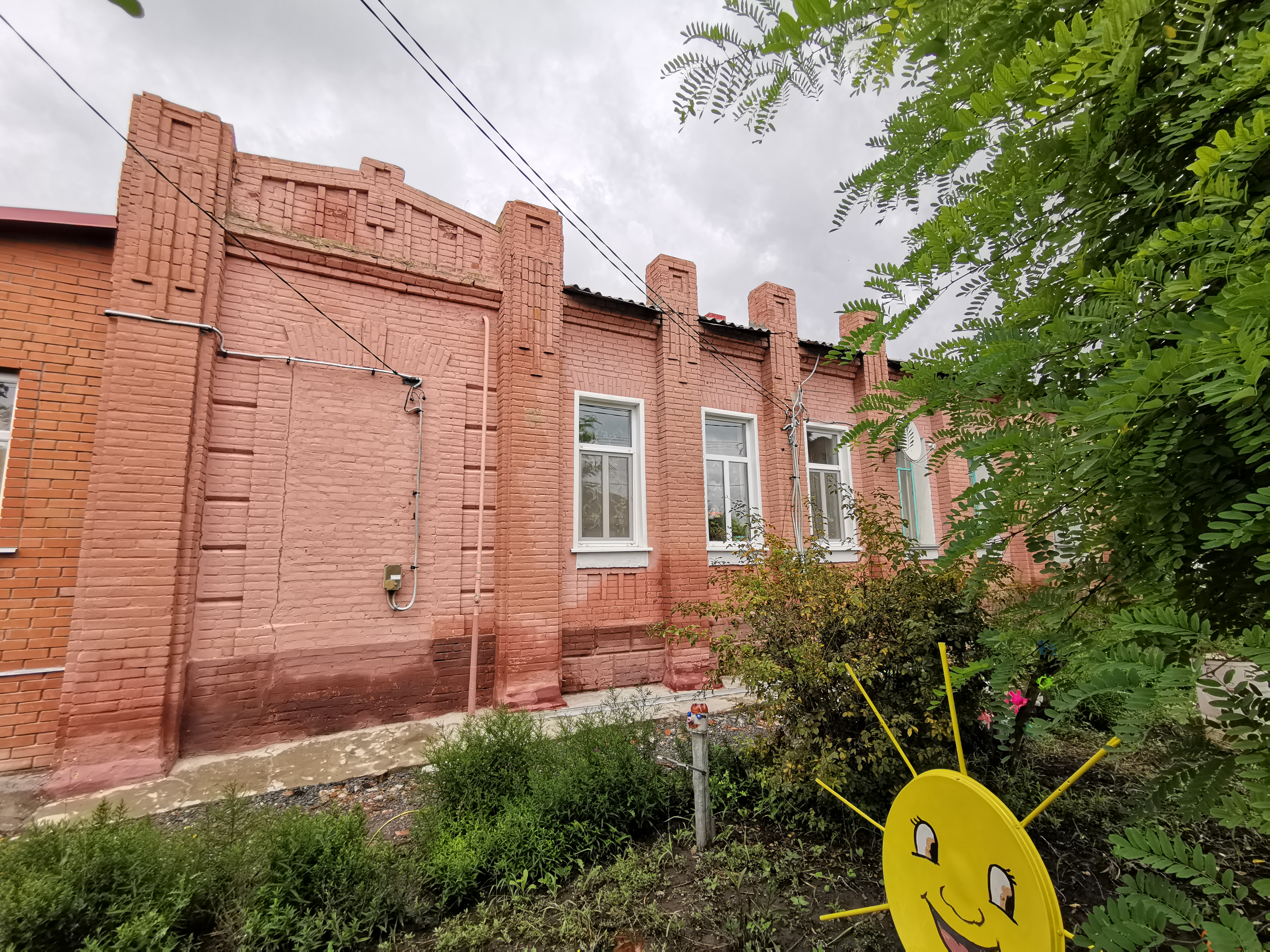 Жилой дом по адресу Малый переулок, 4, в городе Валуйки. Раньше исполнял функции конно-почтовой станции.